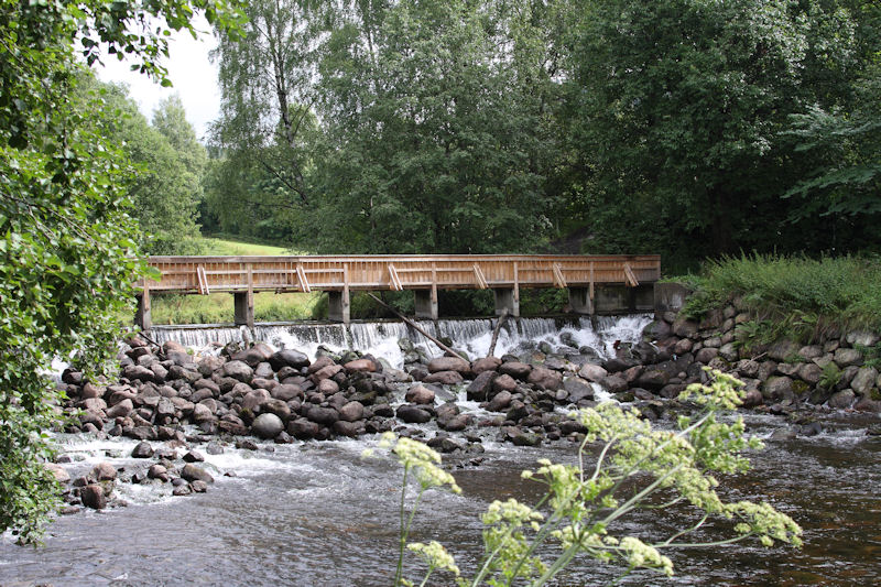 Grønvoldsdammen(Kjelsåsdammen) med Grønvold terskel, som drev sagbruk, seinere turbiner, på Kjelsås Bruk/Mustad. Akerselvas øverste fall.